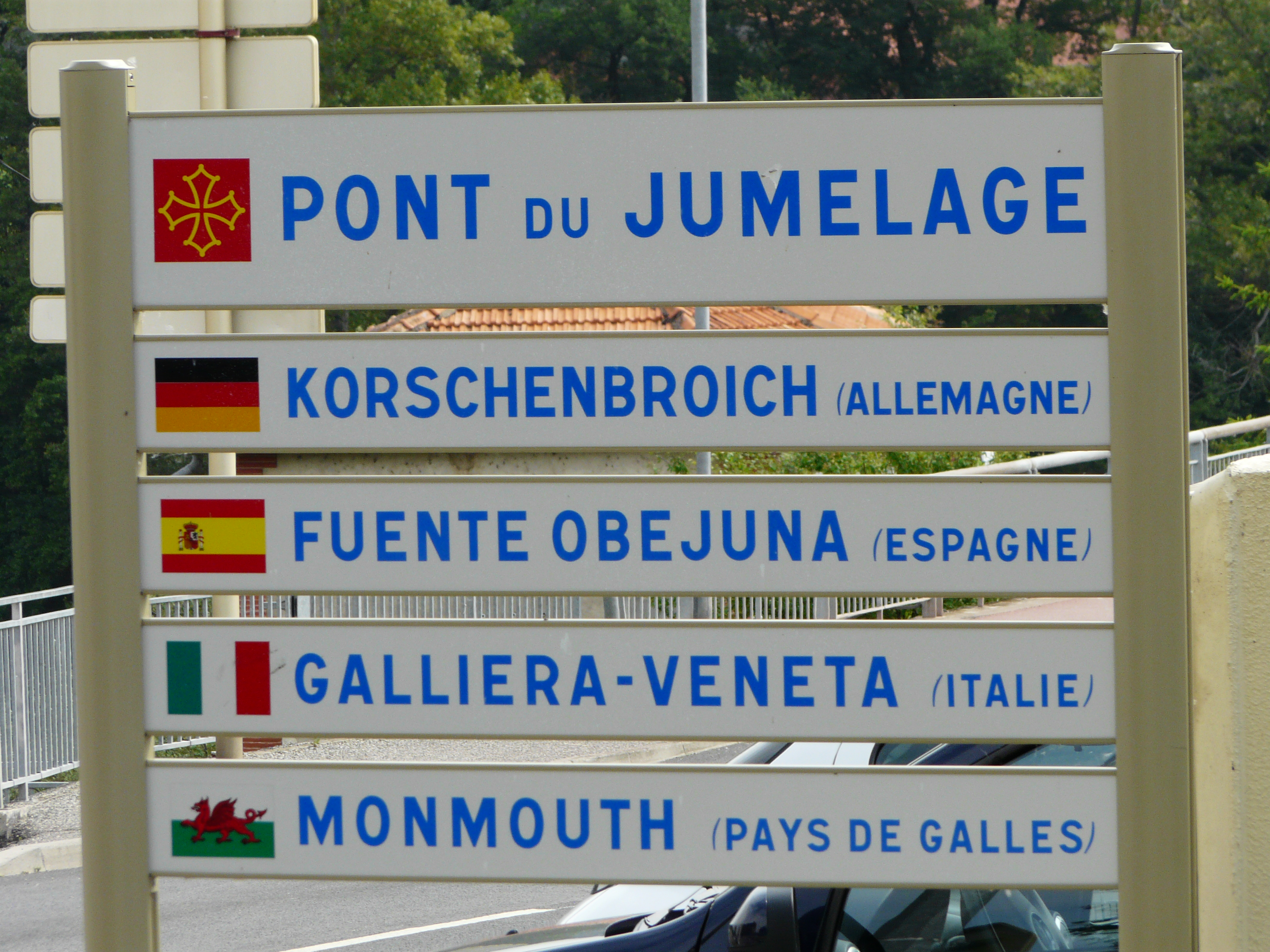 Panneau du pont du Jumelage à Carbonne, Haute-Garonne, France.